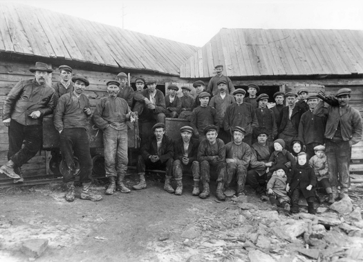 Arbeider utenfor ingangen til sagmo grube. Helt til høyre med boreknippe er Hagbart Hansen. Til venstre i bildet Stiger Israelsson. Det var vanlig i Sulitjelma at arbeidsbeleget ble fotografert i skiftbytte utenfor gruveingangen. 1919 SG.F.10009-2065